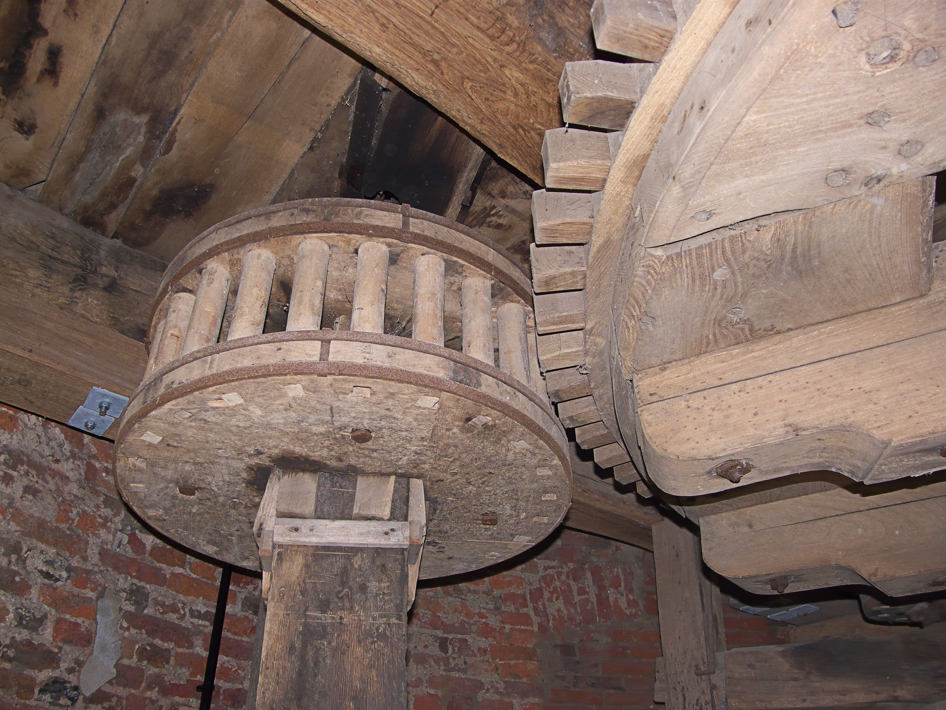 Molen Turmwindmühle Werth, Duitsland: spoorwiel met steenrondsel